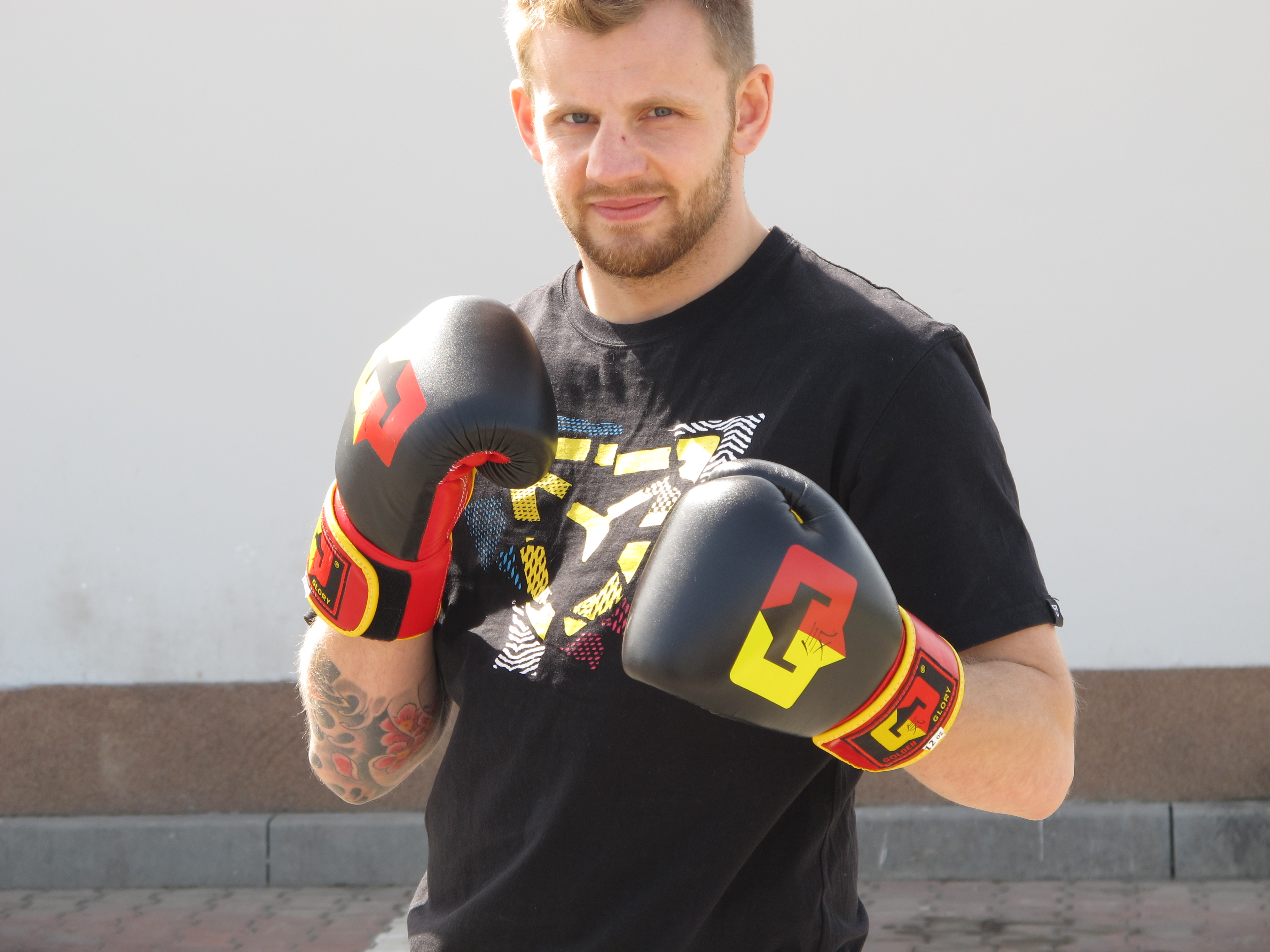 Bc. Jan Homolka (* 16. ledna 1982) je český kickboxer, trenér a kaskadér.